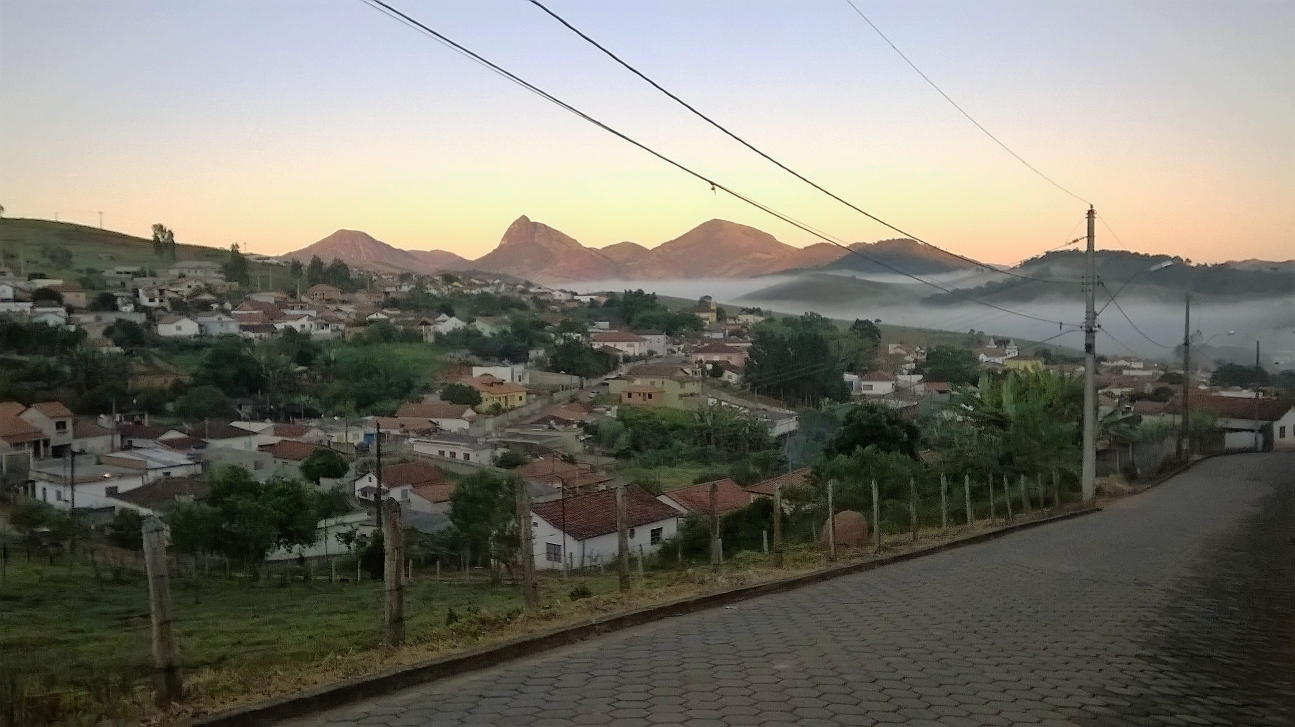 Cidade de Carvalhos,MG